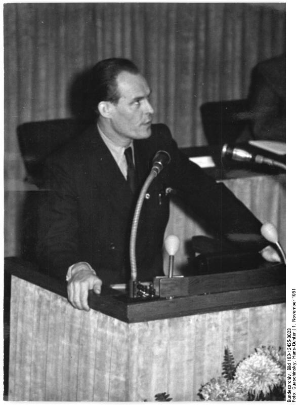 Illus/Quaschinsky 1.11.51 13. und 14. Sitzung der Volkskammer Die Volkskammer der DDR trat am 31.10.51 und 1.11.51 zu ihrer 13. und 14. Sitzung zusammen, um u.a. über das "Gesetz über den Fünfjahresplan zur Entwicklung der Volkswirtschaft der Deutschen Demokratischen Republik", den Rechenschaftsbericht der Regierung über die Einnahmen der Republik und ihre Verwendung für das Rechnungsjahr 1950" und das "Gesetz über die Deutsche Notenbank" zu beraten. UBz: Abgeordneter Gorschütz vom Wirtschaftsausschuß der Volkskammer bei seiner Ansprache.